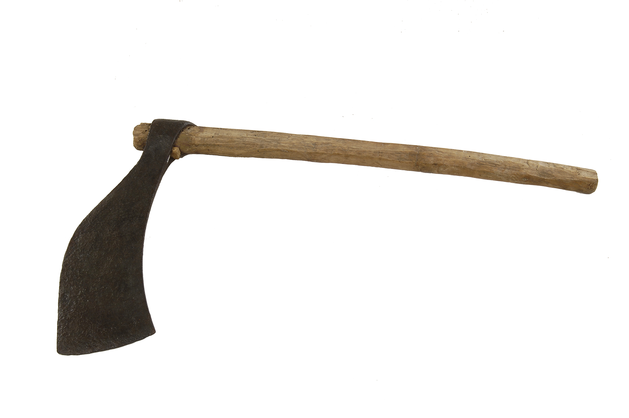 Fotografies dels objectes de l'exposició permanent de la sala "Secà i Muntanya" del Museu Valencià d'Etnologia - Fotografies de Mateo Gamon. Destral